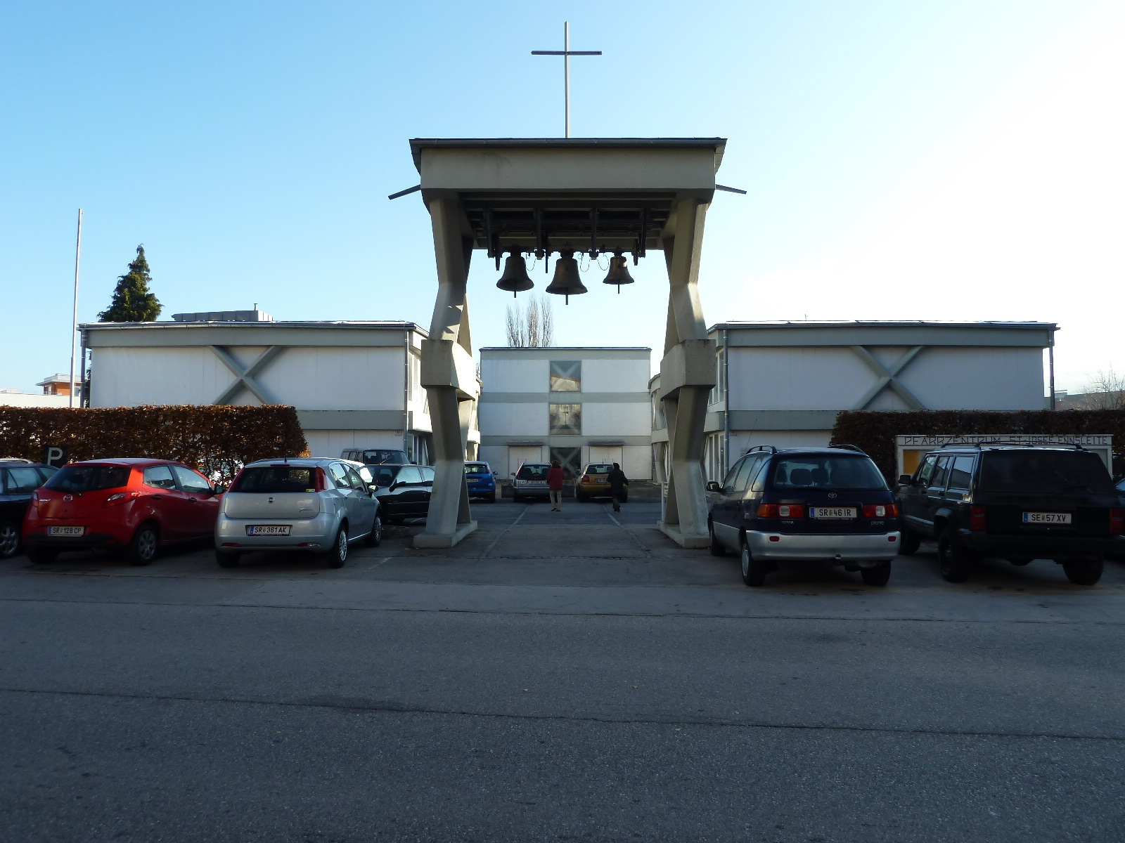 Kath. Pfarrkirche hl. Josef, Seelsorgezentrum Ennsleite